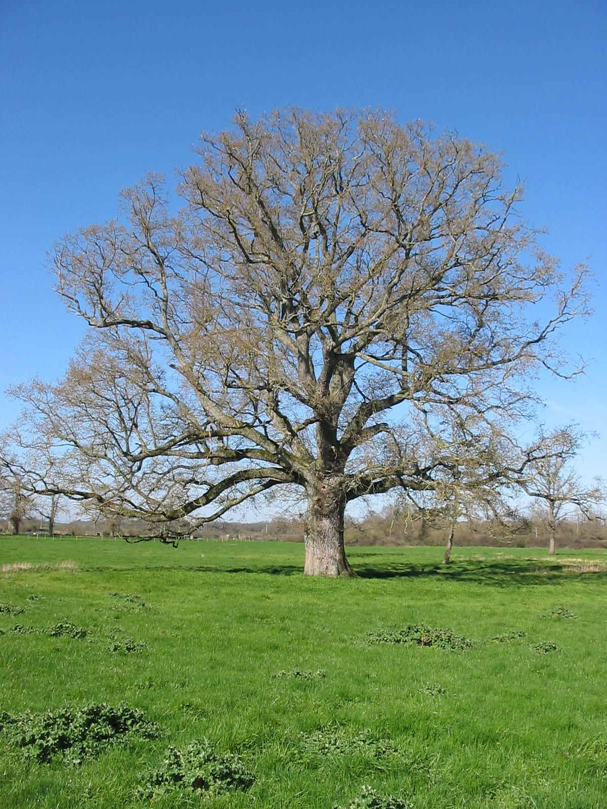 le vieux chêne du parc de la Villenière à La Pouëze (49370)